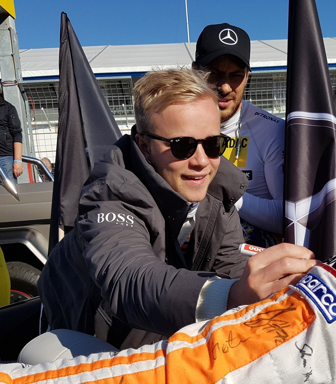 Felix Rosenqvist, Hockenheim, DTM 2016 Season Finale